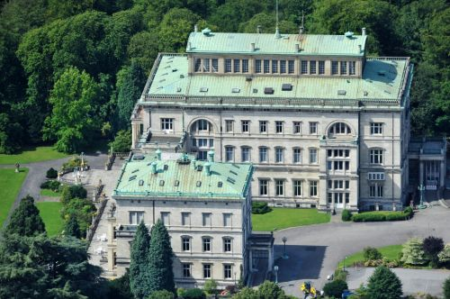 ESSEN 24.07.2012 Blick auf die Villa Hügel im Essener Stadtteil Bredeney. Sie wurde 1873 von Alfred Krupp errichtet und ist das ehemalige Wohn- und Repräsentationshaus der Industriellenfamilie Krupp. // View of the Villa Hugel in the district of Essen Bredeney. It was built in 1873 by Alfred Krupp and is the former residence of the family Krupp.